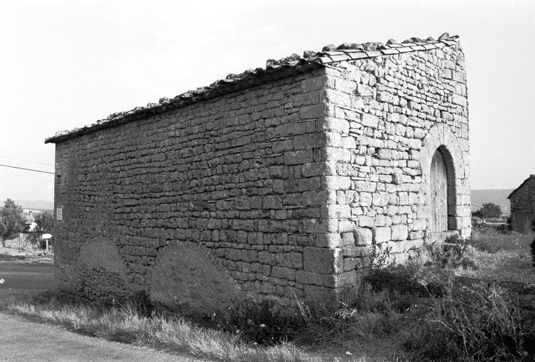 Ancienne grange à blé à Viens (Vaucluse). Bâtisse de plan rectangulaire, à toiture à une pente, couverte en tuiles canal.